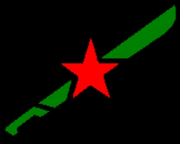 Logo del EPB-M